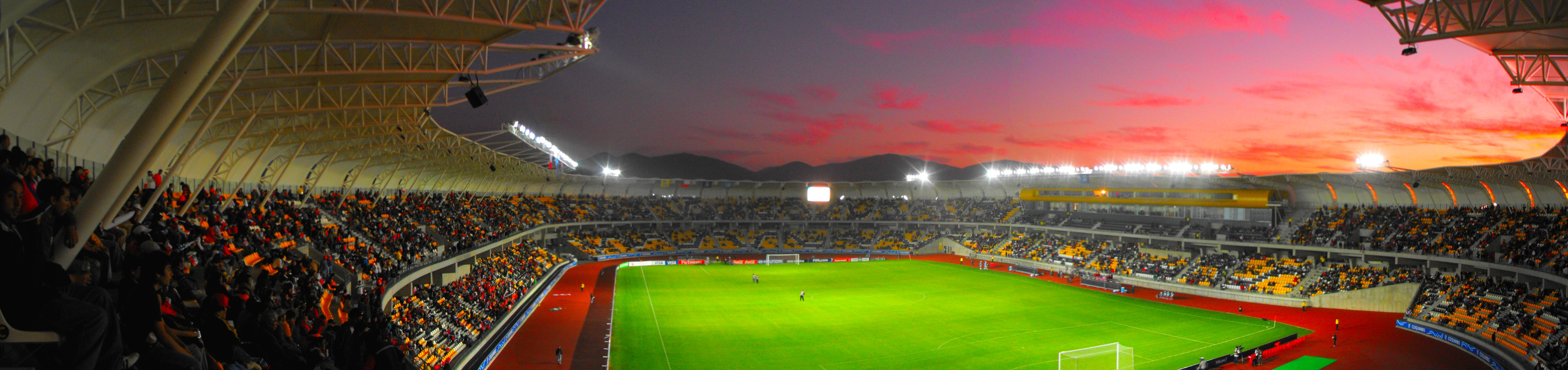 Estadio de Coquimbo